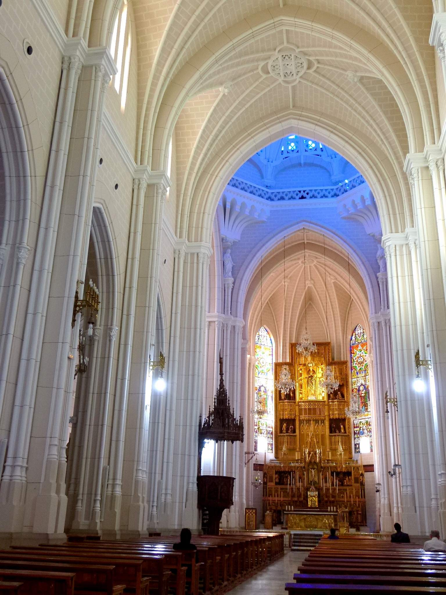 Basílica de la Concepción de Nuestra Señora (Madrid)